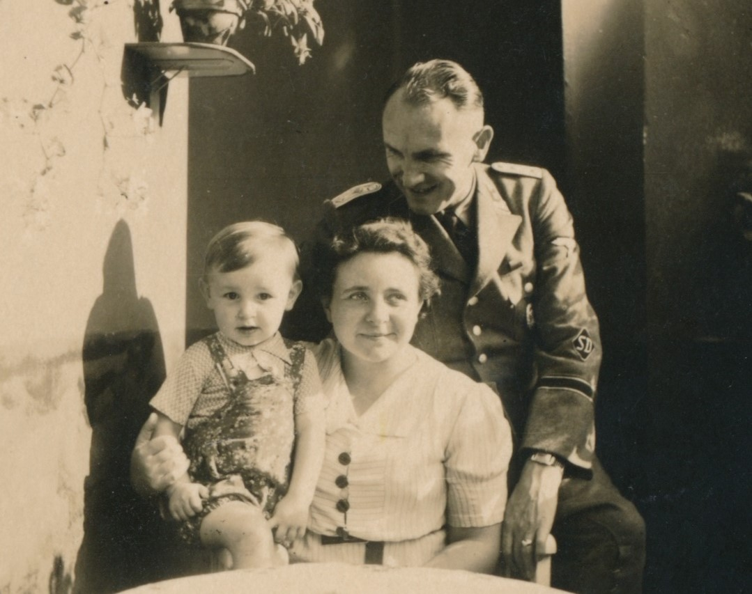 SS-Hauptsturmführer/Kriminalrat Dr. jur. Kurt Riedel mit seiner Familie in Oppeln am 31. August 1939